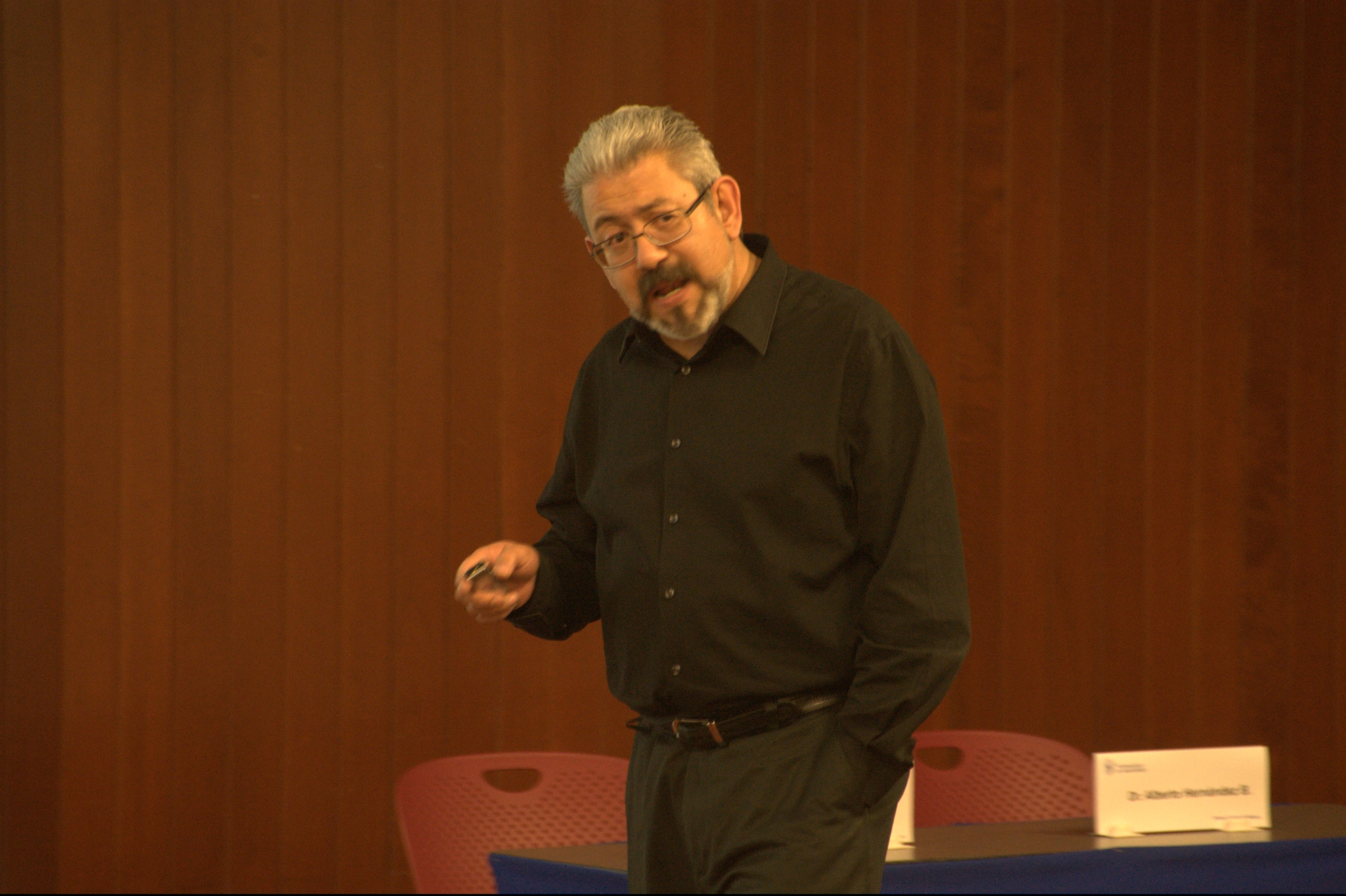 Macario Schettino presentando en ITESM Campus Ciudad de México